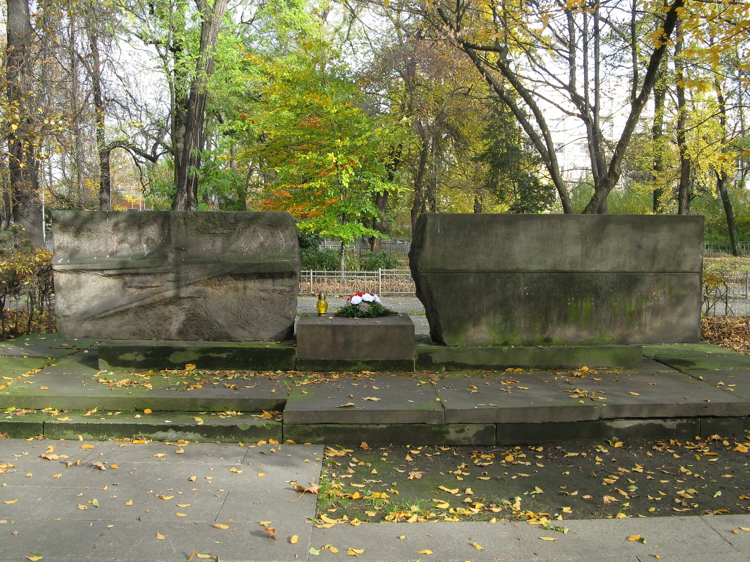 Pomnik z inskrypcją „PAMIĘCI ŻOŁNIERZOM ARMII CZERWONEJ / POLEGŁYM W WALCE Z HITLEROWSKIM NAJEŹDZCĄ” w Parku Hutników w Chorzowie, zaprojektowany przez Gerarda Grzywaczyka.